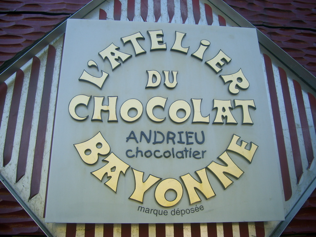 L'atelier du chocolat- Bayonne